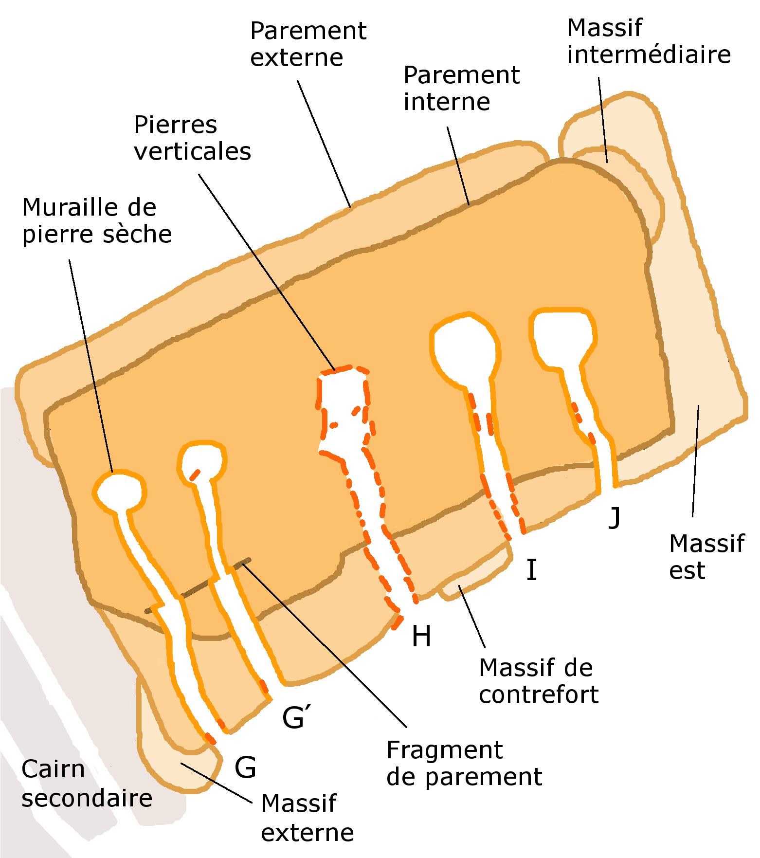 Plan du cairn primaire de Barnenez, en Plouezoc'h, Finistère, Bretagne. Plan très approximatif : je n'ai pas trop respecté formes et proportions, ne cherchant qu'à faire comprendre l'organisation. Je me suis basé sur le fichier Commons « Barnenez plan.JPG » d'Athinaios (j'ai fait pivoter « nord en haut » en me fiant à la petite flèche « N »). J'ai corrigé ensuite d'après les plans d'ensemble et de détail figurant dans Pierre-Roland Giot, Barnenez, Carn, Guennoc, Université de Rennes I, 1987, t. II.